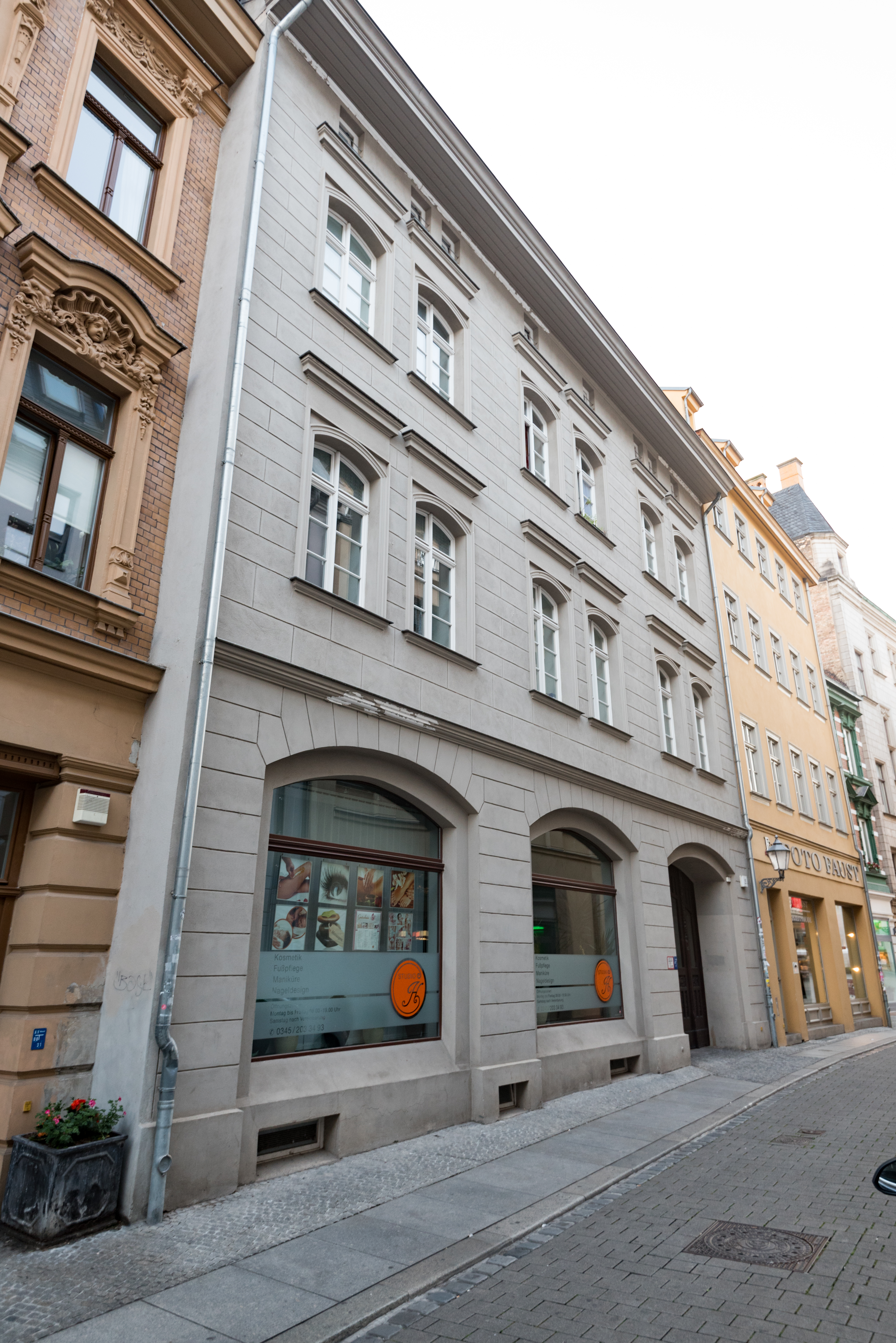 Halle (Saale), Große Märkerstraße 25